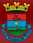 Brasão do município de Planalto-RS